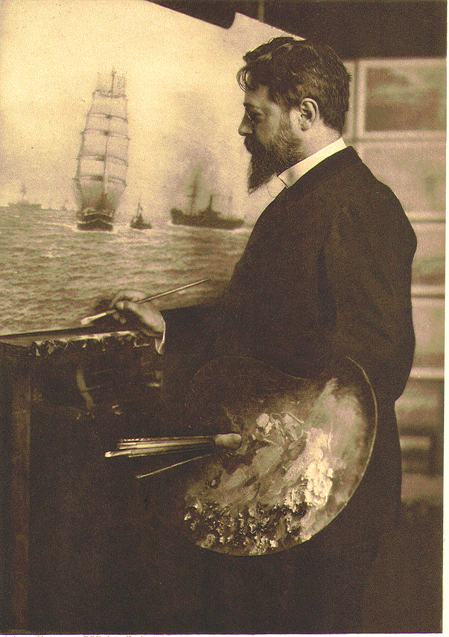 Hugo Schnars-Alquist, Hamburger Marinemaler